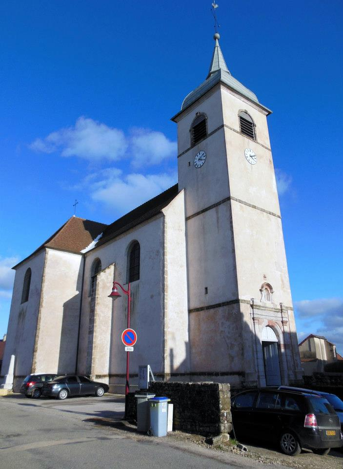 Eglise de l'Assomption (XVIIIe s), classée MH (2003), Rue du Lavoir, à Offlanges (Jura).